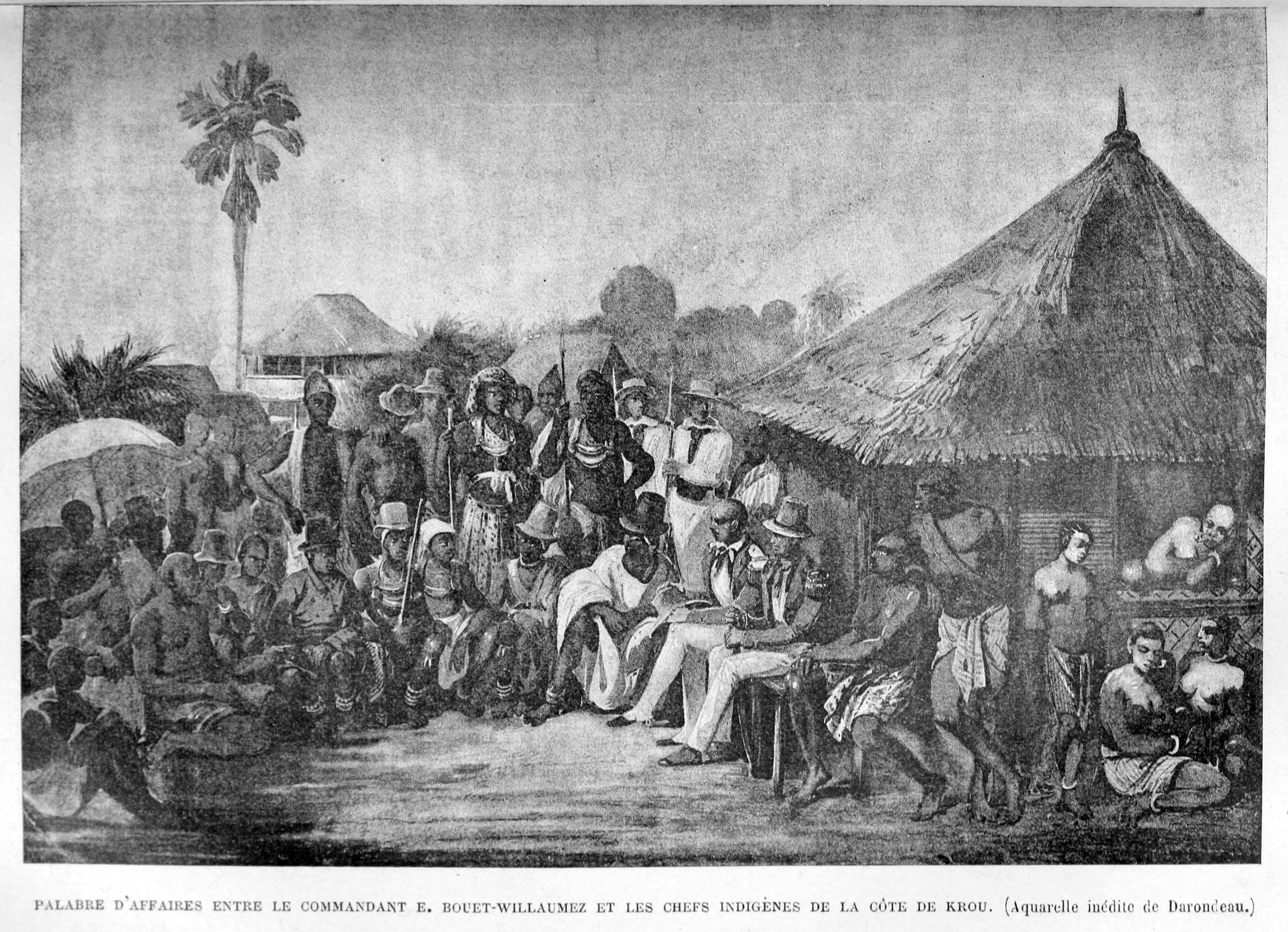 Palabre d'affaires entre le commandant E. Bouët-Willaumez et les chefs indigènes de la côte de Krou (aquarelle inédite de Darondeau), in Côte occidentale d'Afrique : vues, scènes, croquis, p. 265, Colonel Frey